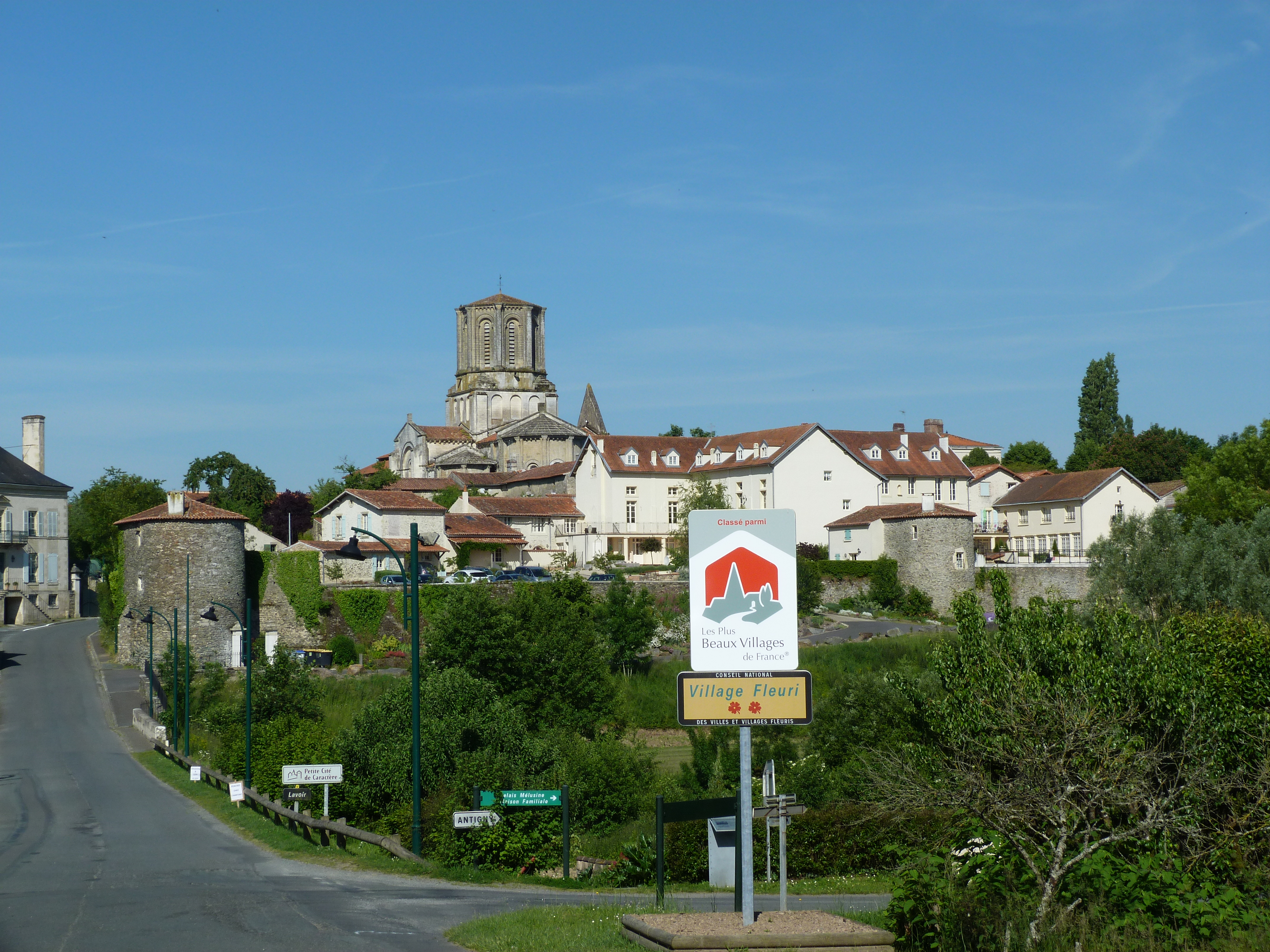 Vouvant, un des plus beaux villages de France, Petite cité de caractère des pays de la Loire et village fleuri.